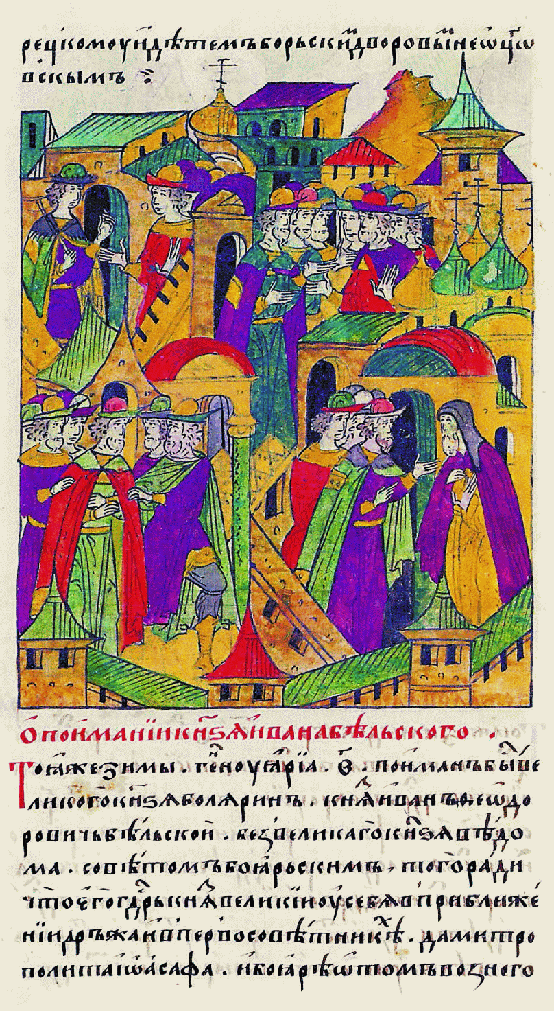 Миниатюра Лицевого летописного свода XVI в.: "О поимании князя Ивана Бельского. Той же зимой 2-го января взят был ве- ликого князя боярин князь Иван Федорович Бельский без великого князя ведома, сове- том боярским, из-за того, что его государь князь великий у себя в приближении держал и в первосоветни- ках, да митрополита Иоаса фа. И бояре о том вознегодовали и детям боярским дворовым, не отцов- ским. 161 а с князем Ива- ном Васильевичем с Шуйским ссылаться во Владимир. А князь Иван Шуйской тогда был во Владимире, послан был стоять для бережения от казан- ских людей. [на князя Ивана и на митрополита, и начали зло на них советовать со своими советниками]».